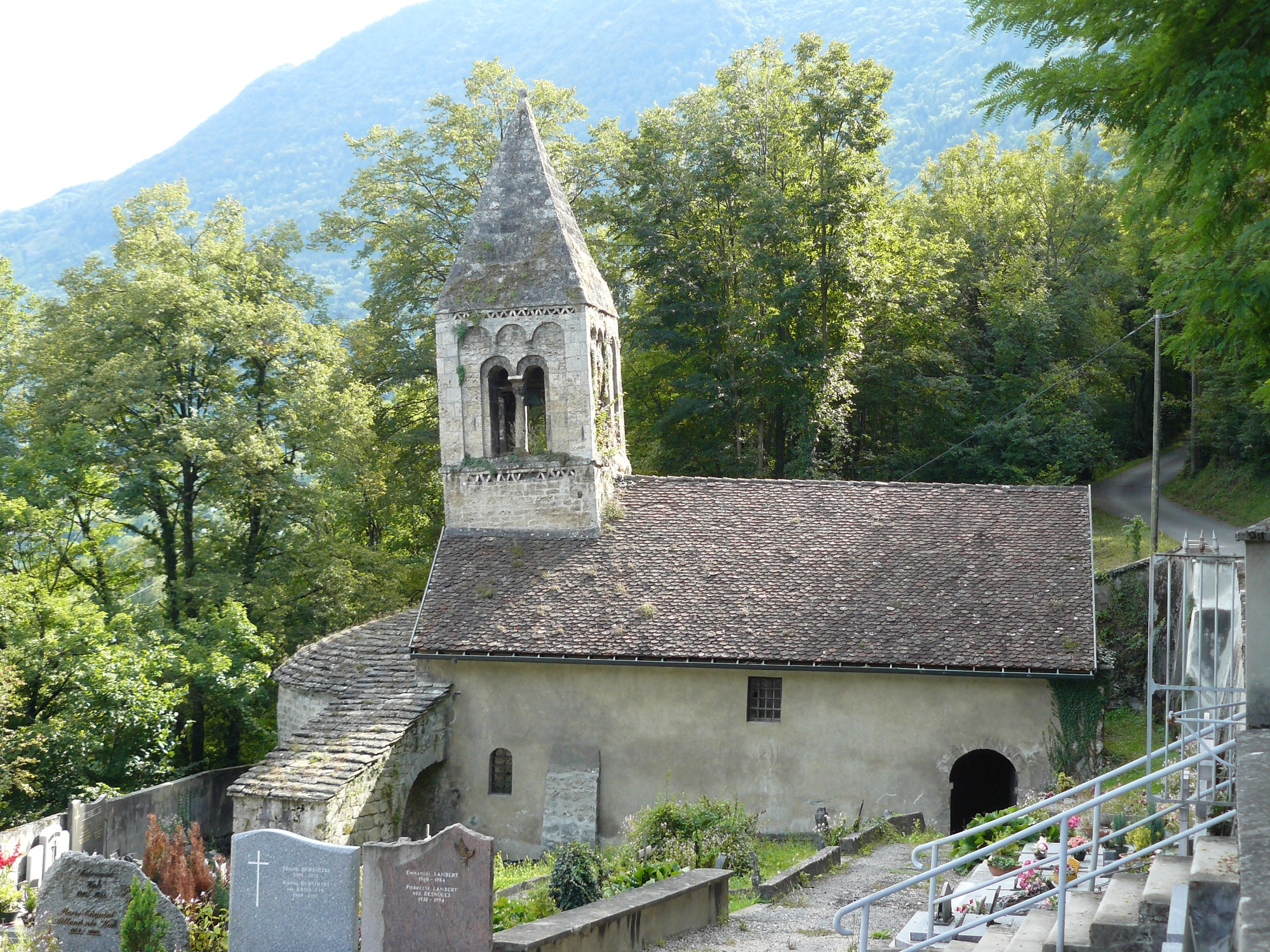 Église paroissiale Saint-Firmin dite Sainte-Marie de Notre-Dame-de-Mésage .